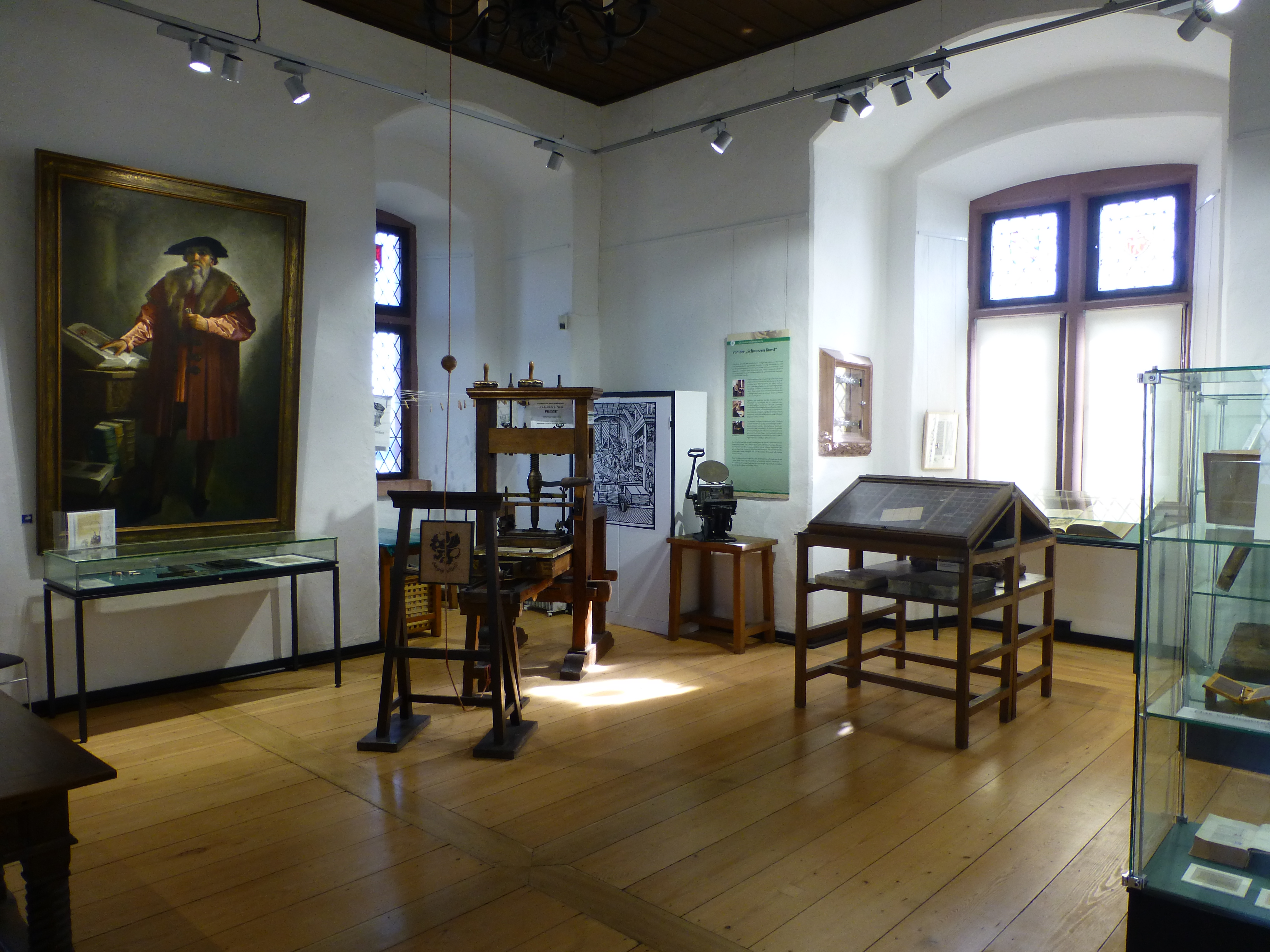 Museum der Kurfürstlichen Burg; Gutenberg-Gedenkstätte im 2. Obergeschoss des Wohnturms